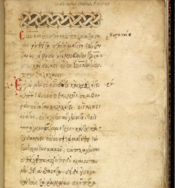 Синезий Киренский Catastasis. Манускрипт второй половины 16 века. Британская библиотека.